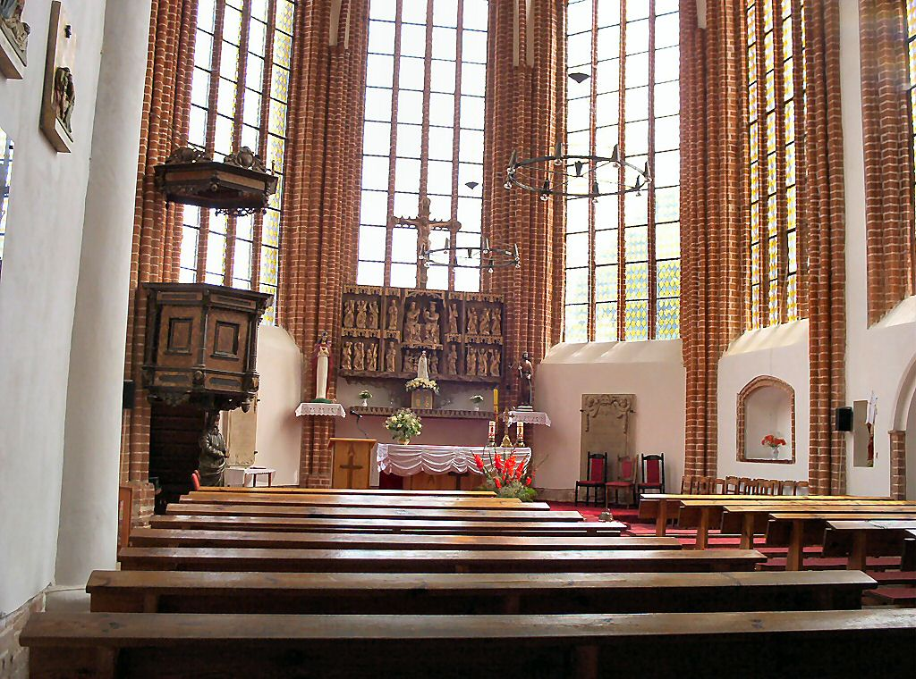 Kołbacz - prezbiterium